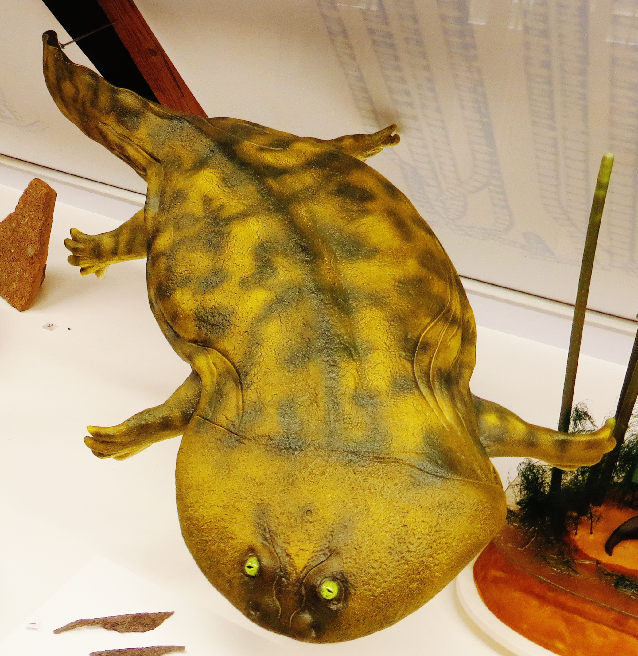 Took the picture at Muschelkalkmuseum Ingelfingen